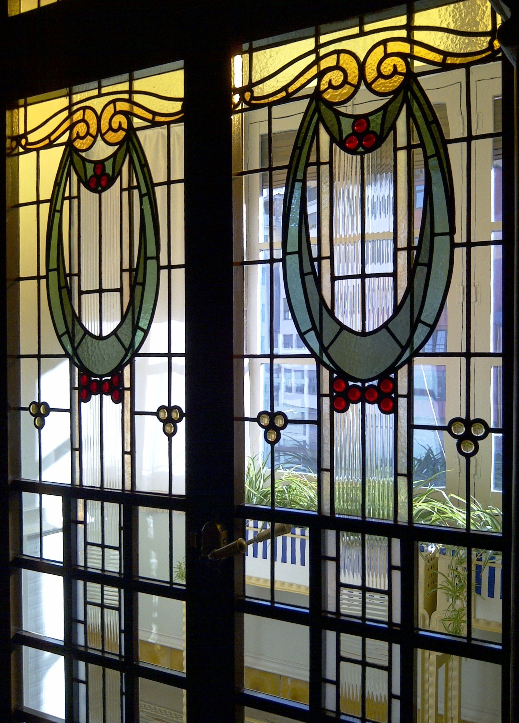 mostra dels vitralls interiors de la Casa Masó